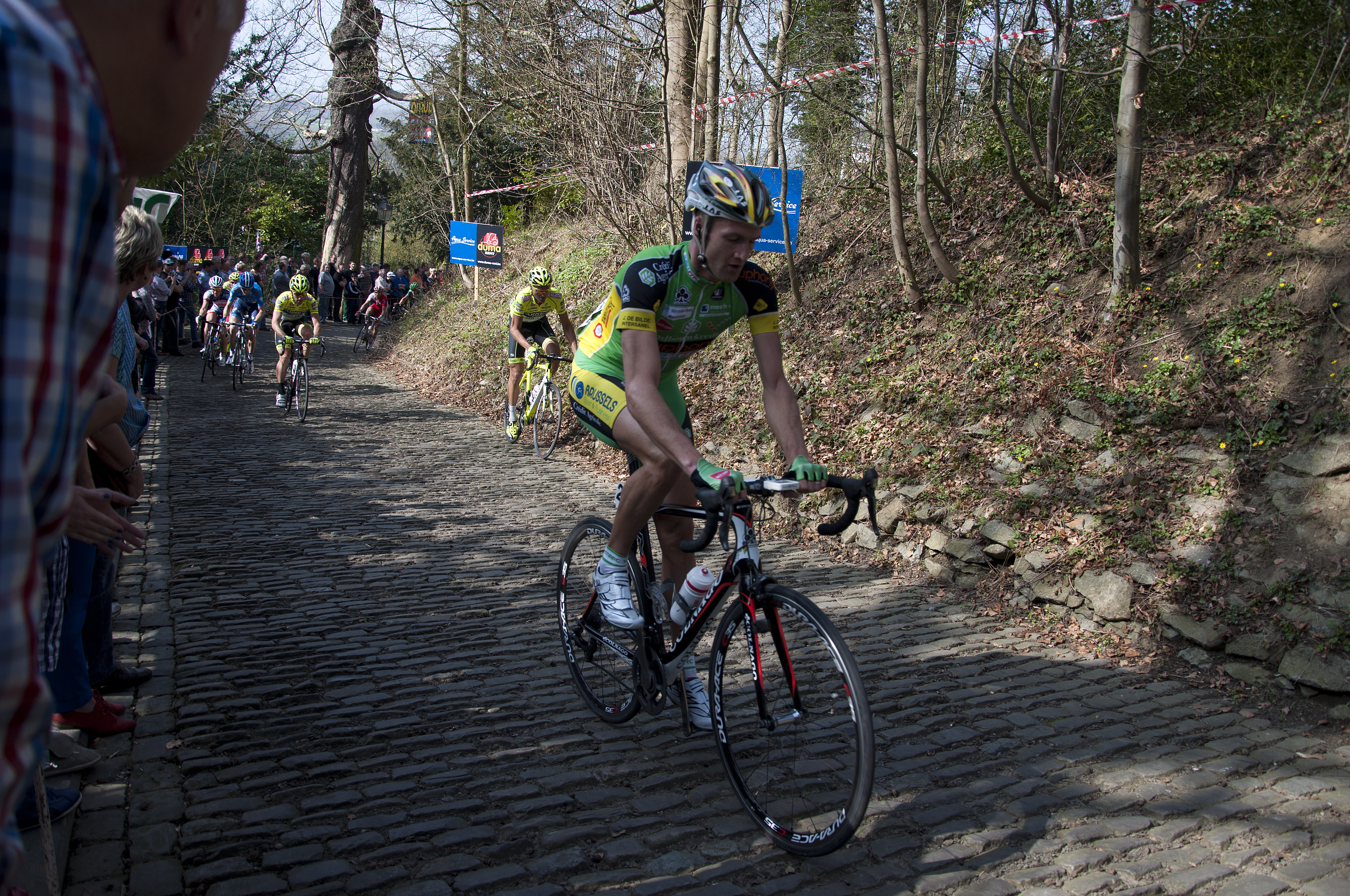 Sébastien Delfosse op de Muur van Geraardsbergen tijdens de E3 Harelbeke 2012